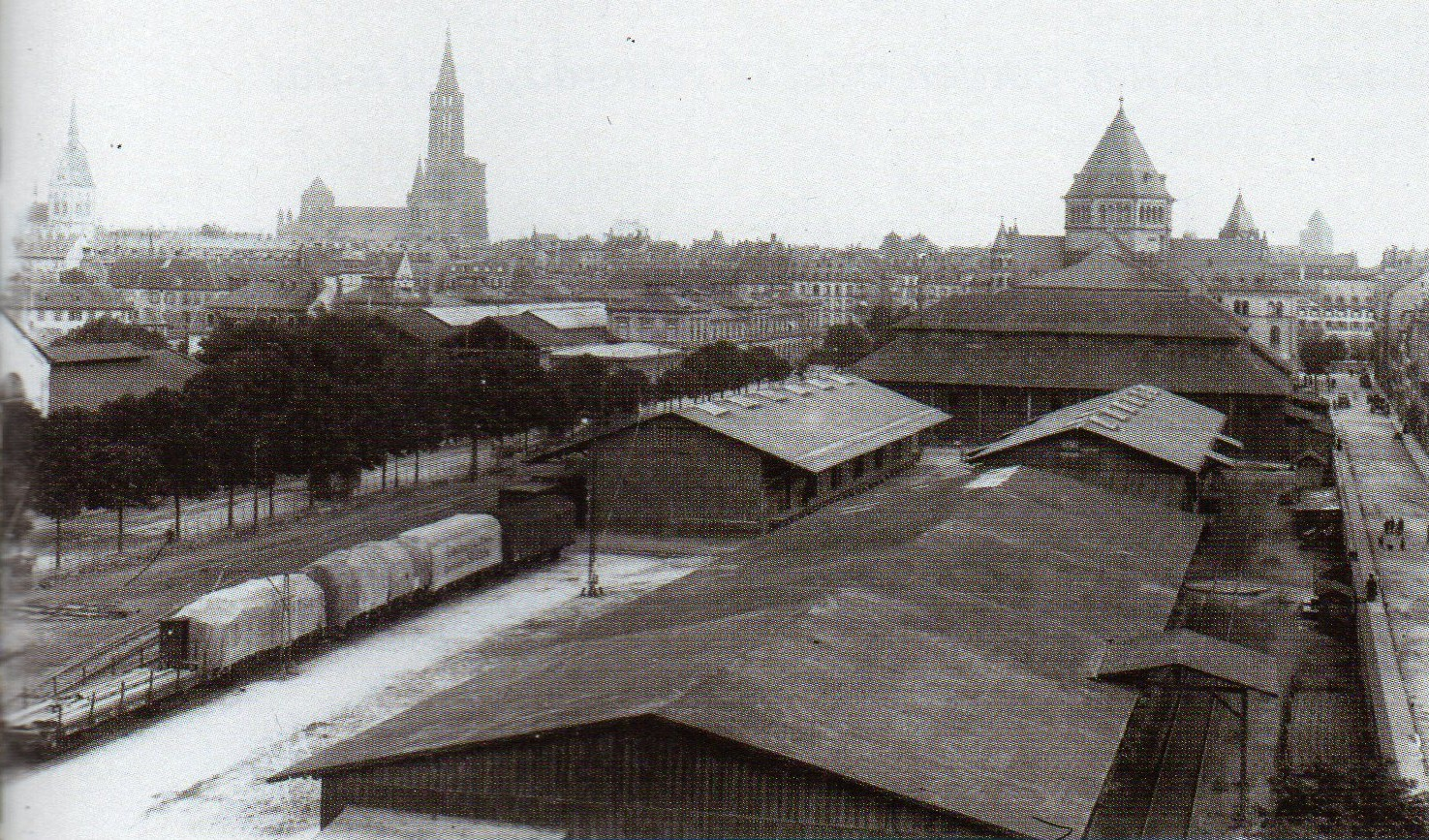 Arrière de l'ancienne gare de Strasbourg, vue depuis l'actuel boulevard Wilson; Image numérisée. Carnets de ville, document conçu et réalisé par la Direction de l'Urbanisme, de l'aménagement et de l'habitat. Ville de Strasbourg 2013.